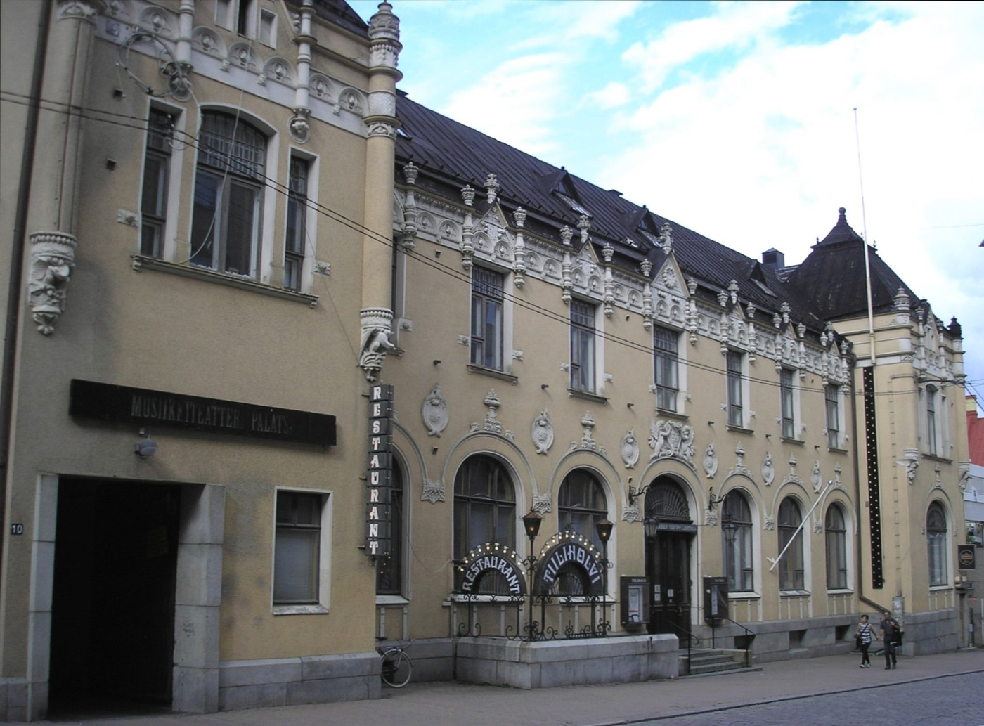 Tampereen ylioppilastalo, jossa toimii esimerkiksi Musiikkiteatteri Palatsi, kesällä 2016.